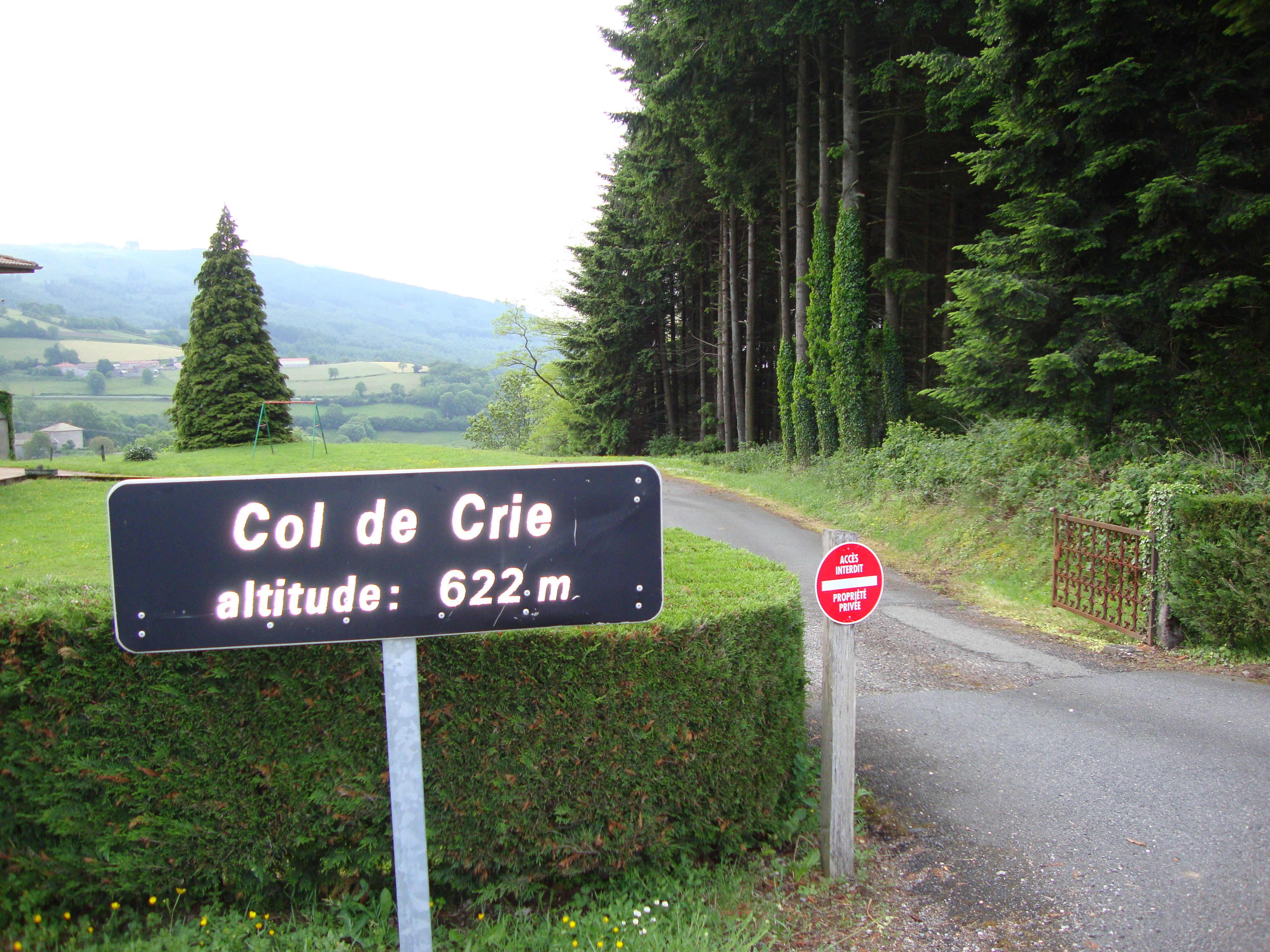 Monsols (Rhône, Fr) Col de Crie, panneau et paysage.